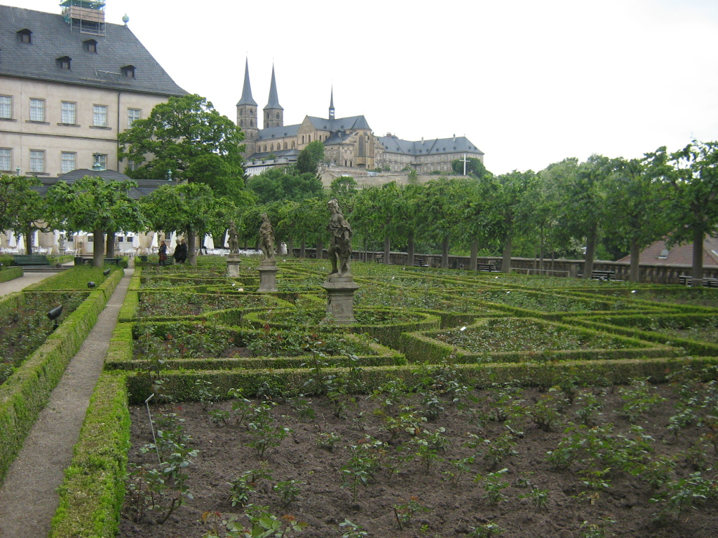 Park u bašti ruža u Banbergu, projekt Baltazara Nojmana -Nemačka